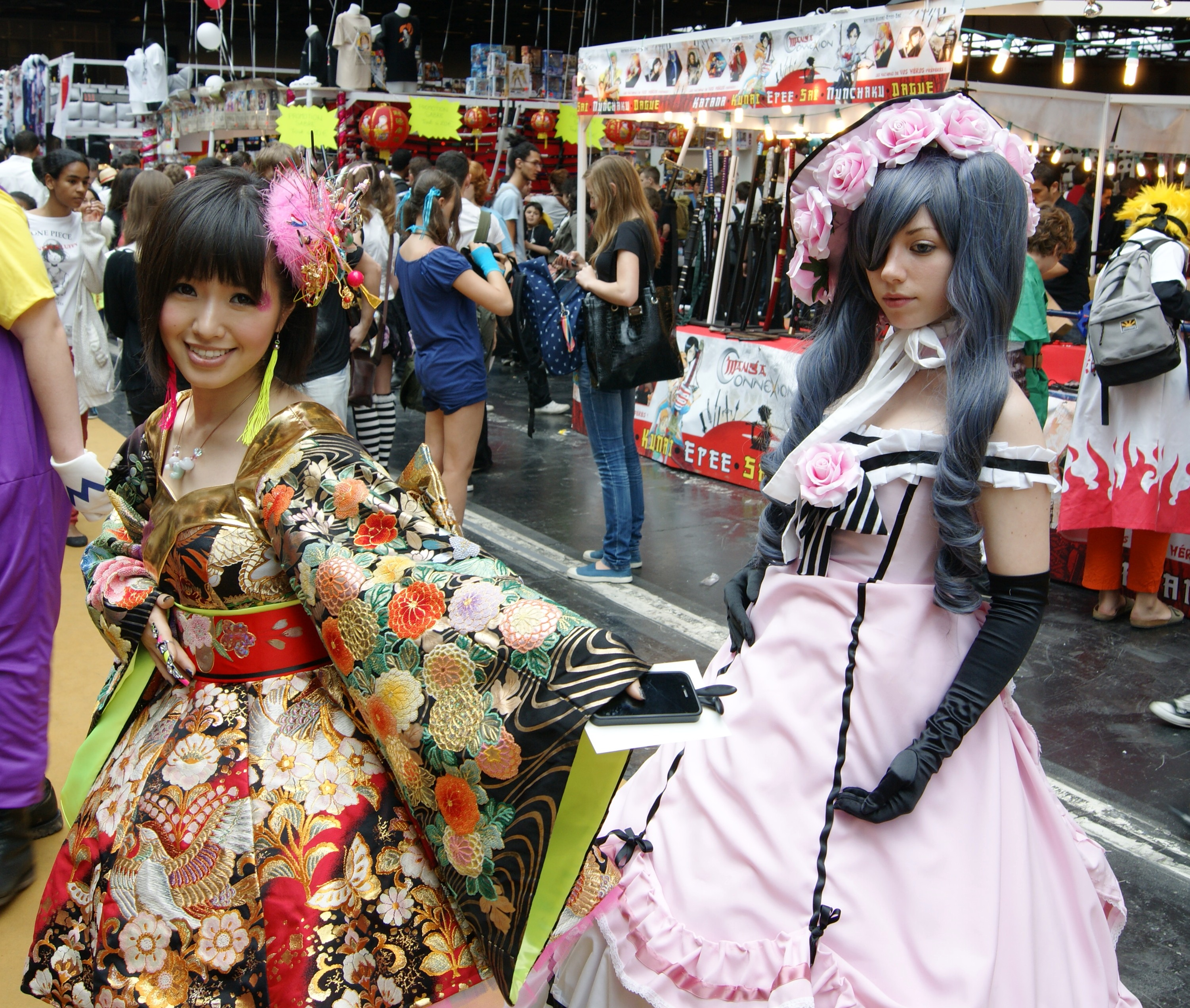 Cosplay - Japan Expo 2012